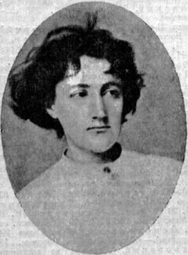 Natalija Aleksandrovna Armfel'dt (1850-1887)